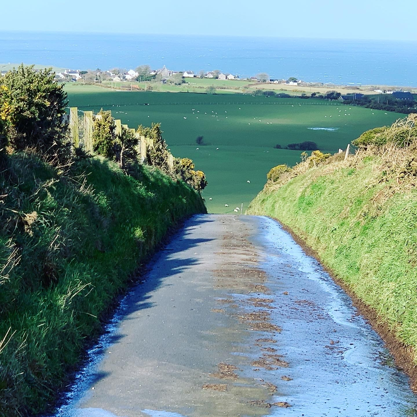 Tudweiliog o Ben Foel.